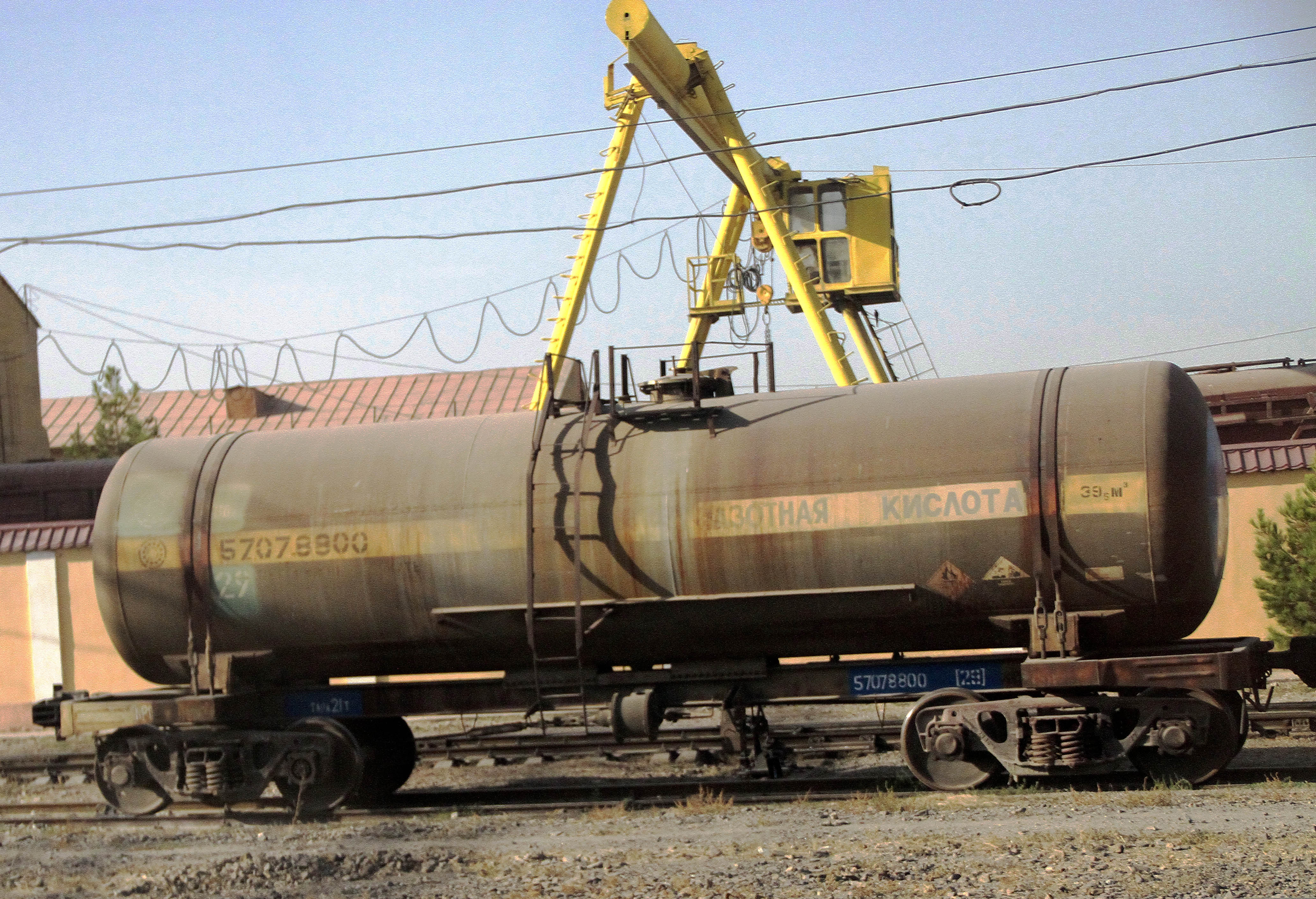 Цистерна с азотной кислотой